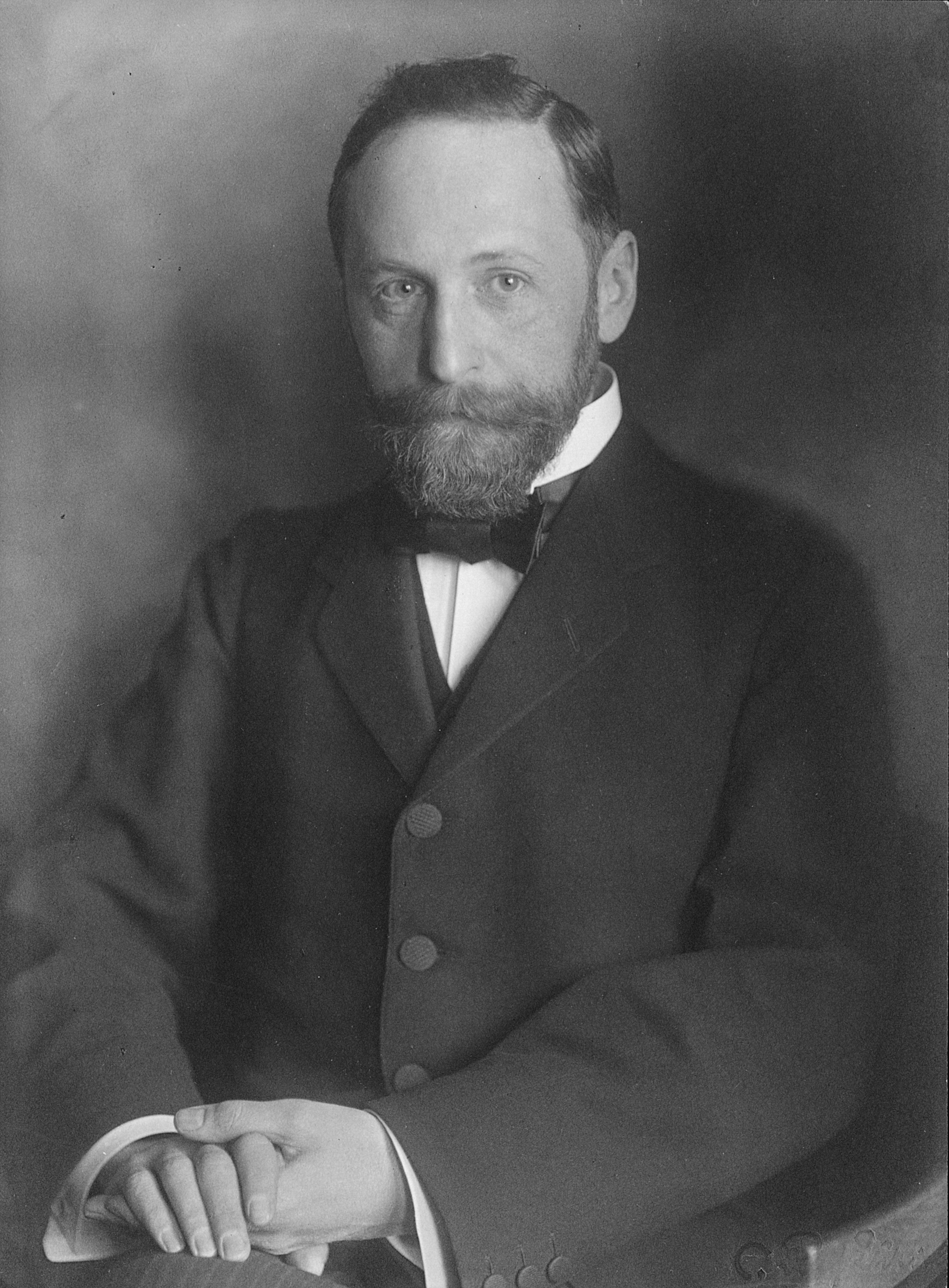 Richard Martin Willstätter (* 13. August 1872 in Karlsruhe; † 3. August 1942 in Muralto), Portrait von der ETH Zürich, 1905-1912